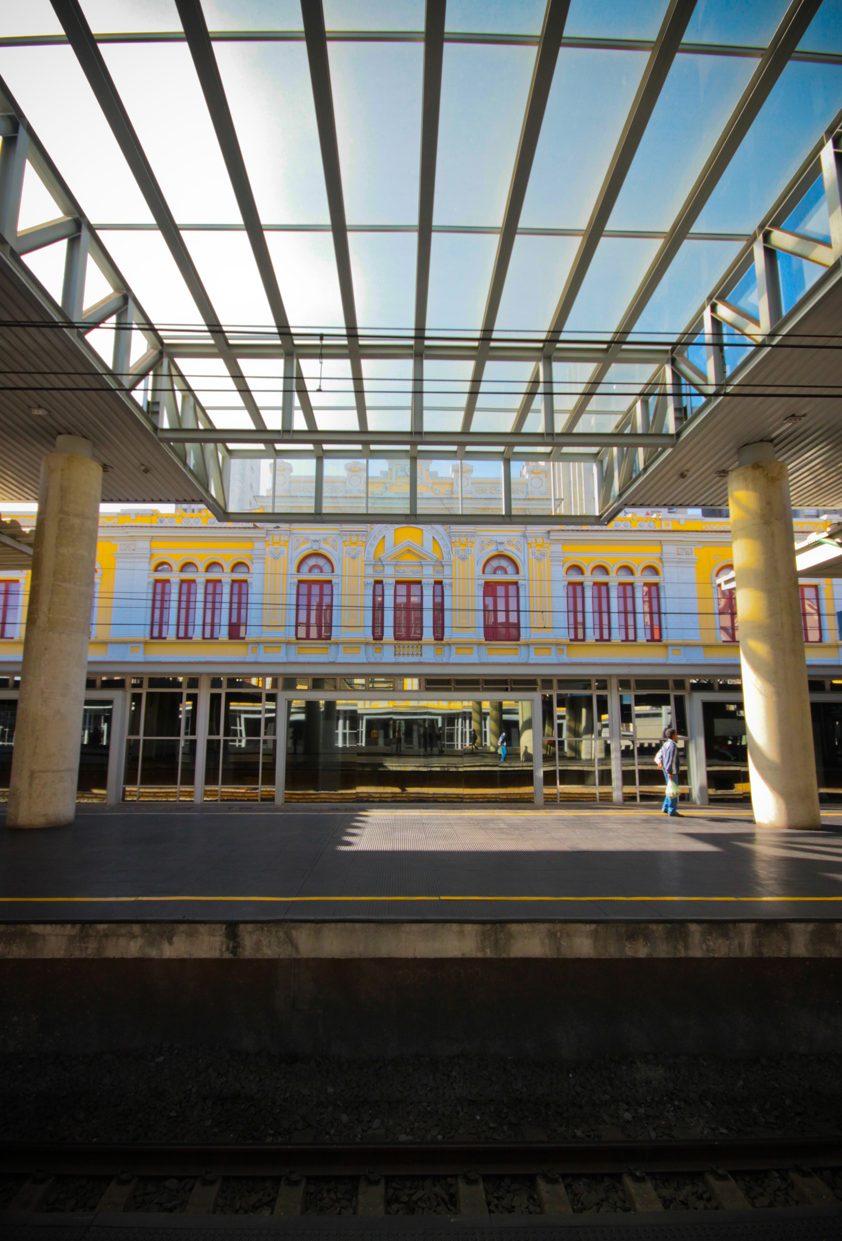 Arquitetura da Estação Central do Metrô de Belo Horizonte.